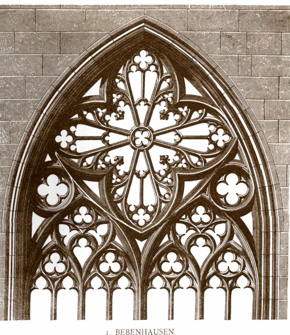 Bebenhausen, Monastery, Window.